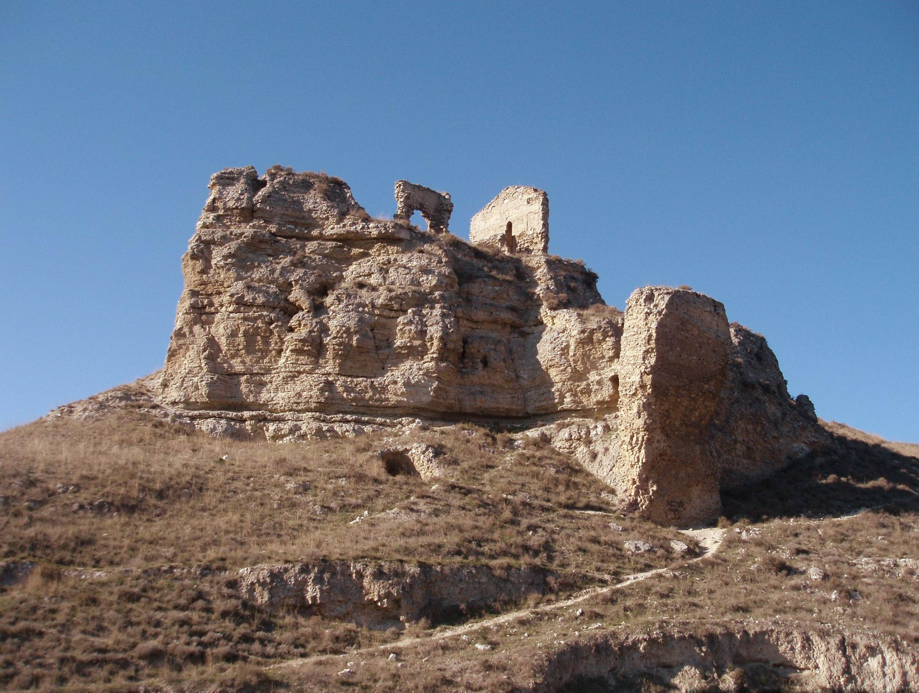 Vista frontal del castillo de Miranda visto desde el camino viejo de Alfocea.